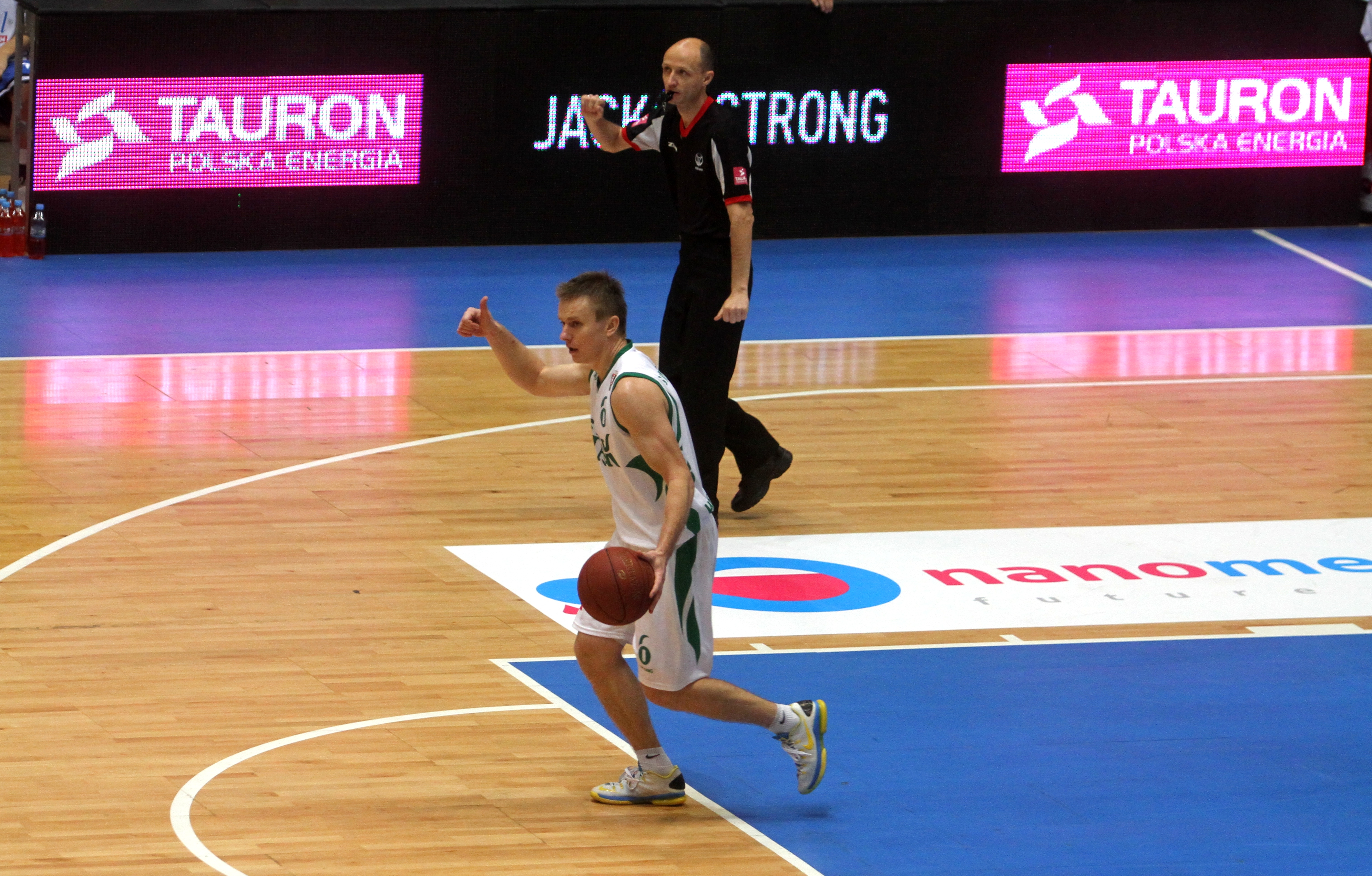 Robert Skibniewski, Śląsk Wrocław